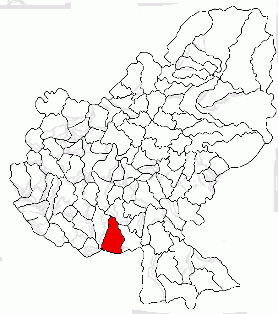 Categorie:Hărţi ale judeţului Mureş